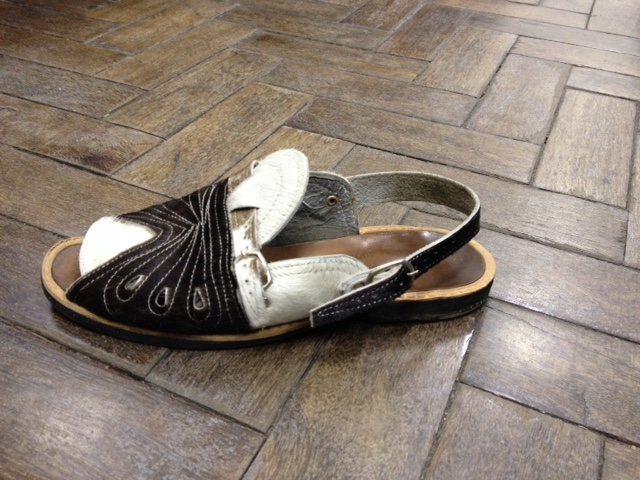 Típico Tamanco Sertanejo da Região Nordeste do Brasil. Itaporanga - PB, Brasil